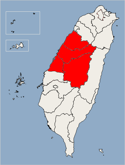 行政院中部聯合服務中心管轄範圍